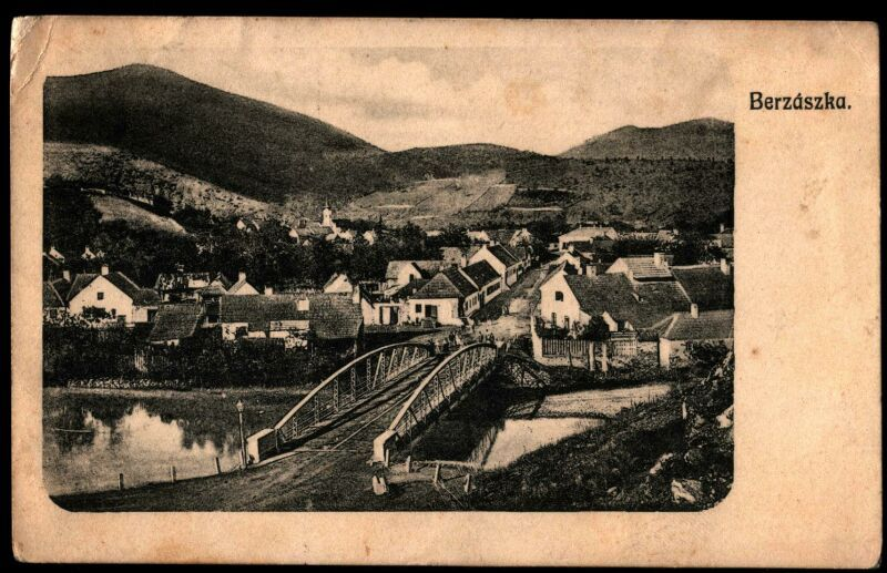 19. század végi képeslap Berzászkáról